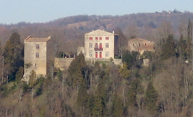 Château de Terride, à Mirepoix (Ariège, France).